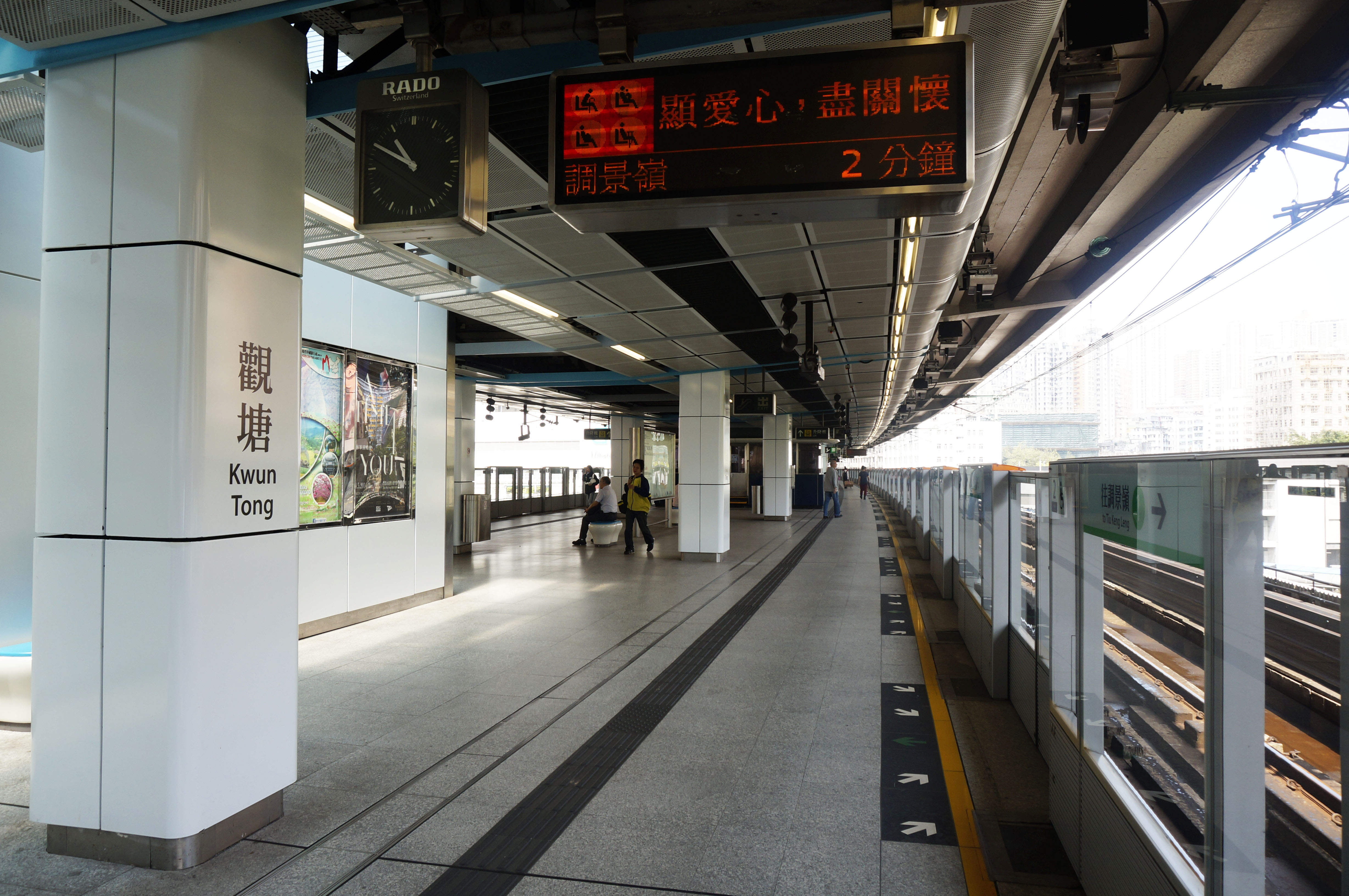 港鐵觀塘站月台